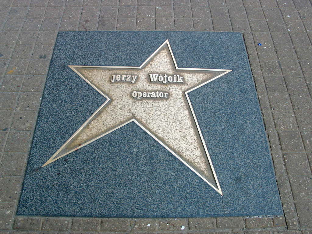 Łódź Walk of Fame - operator filmowy Jerzy Wójcik.